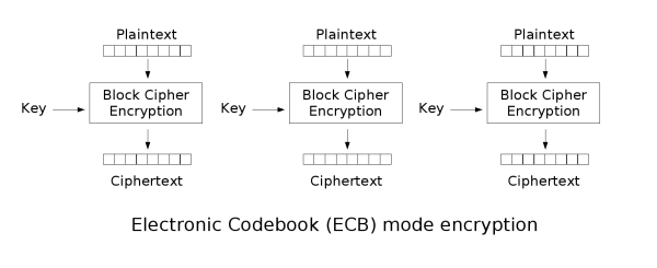 Esquema del Cifrado ECB